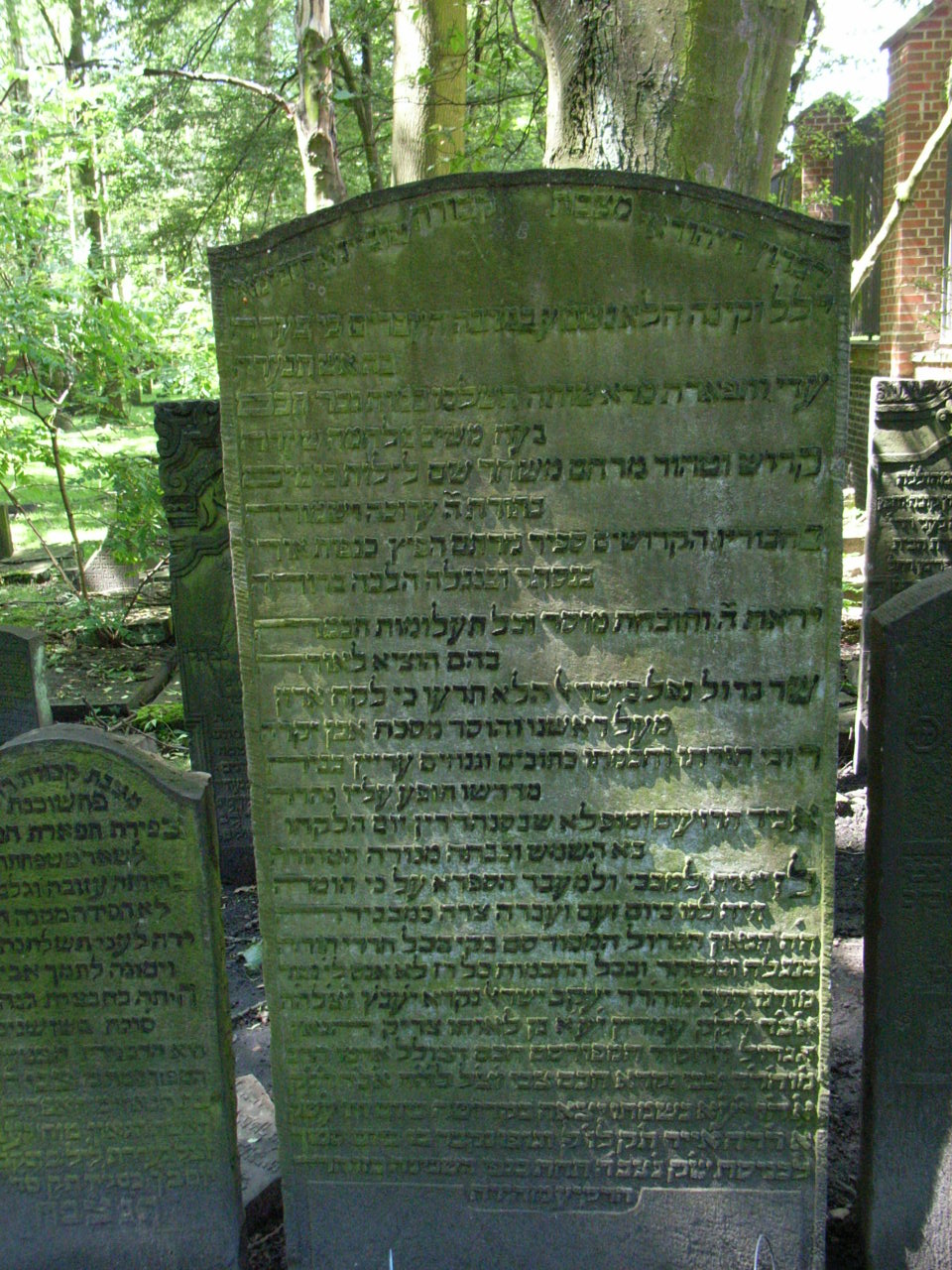 Grab Jacob Emden Hamburg-Altona, Königstraße